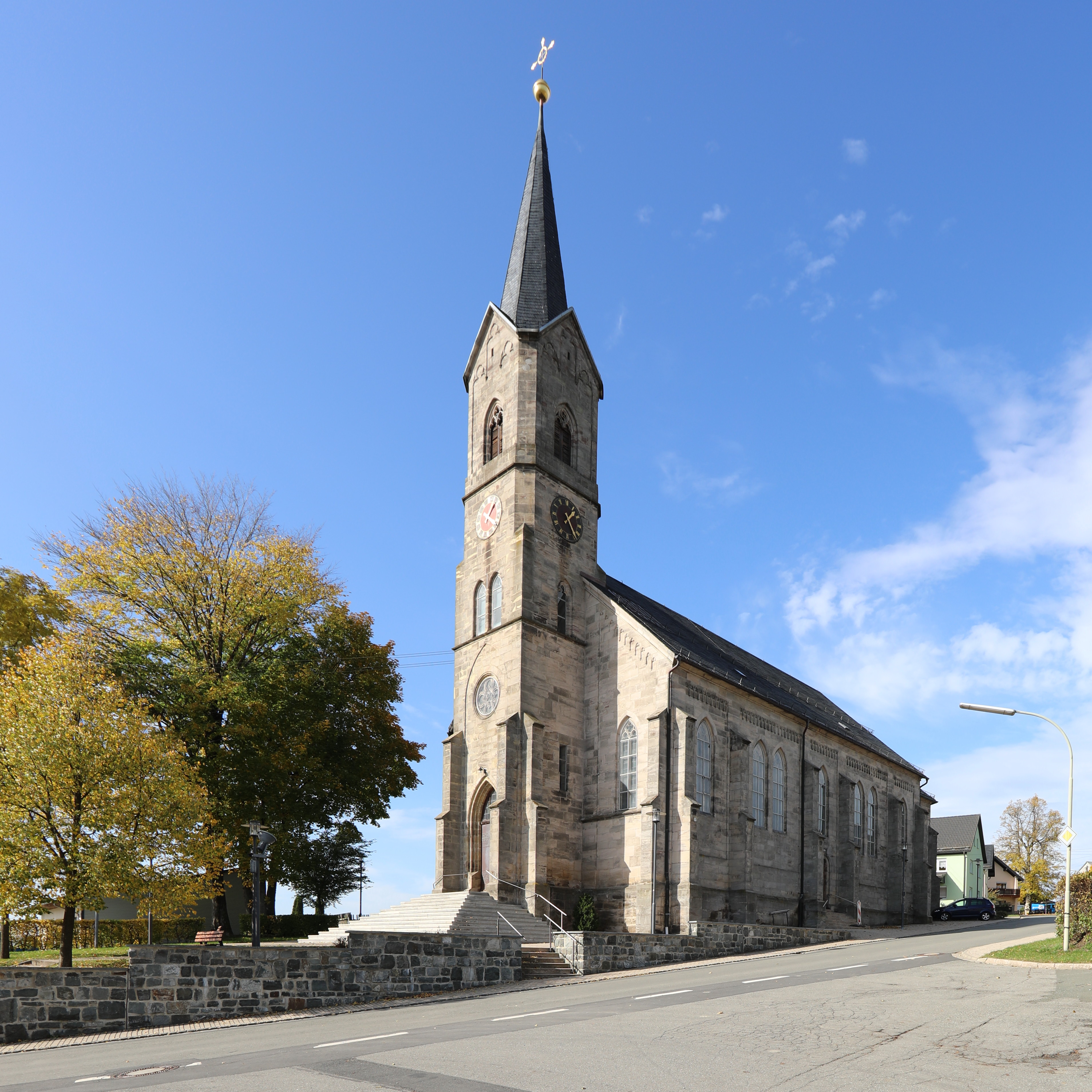 Katholische Kirche St. Jakobus in Tschirn